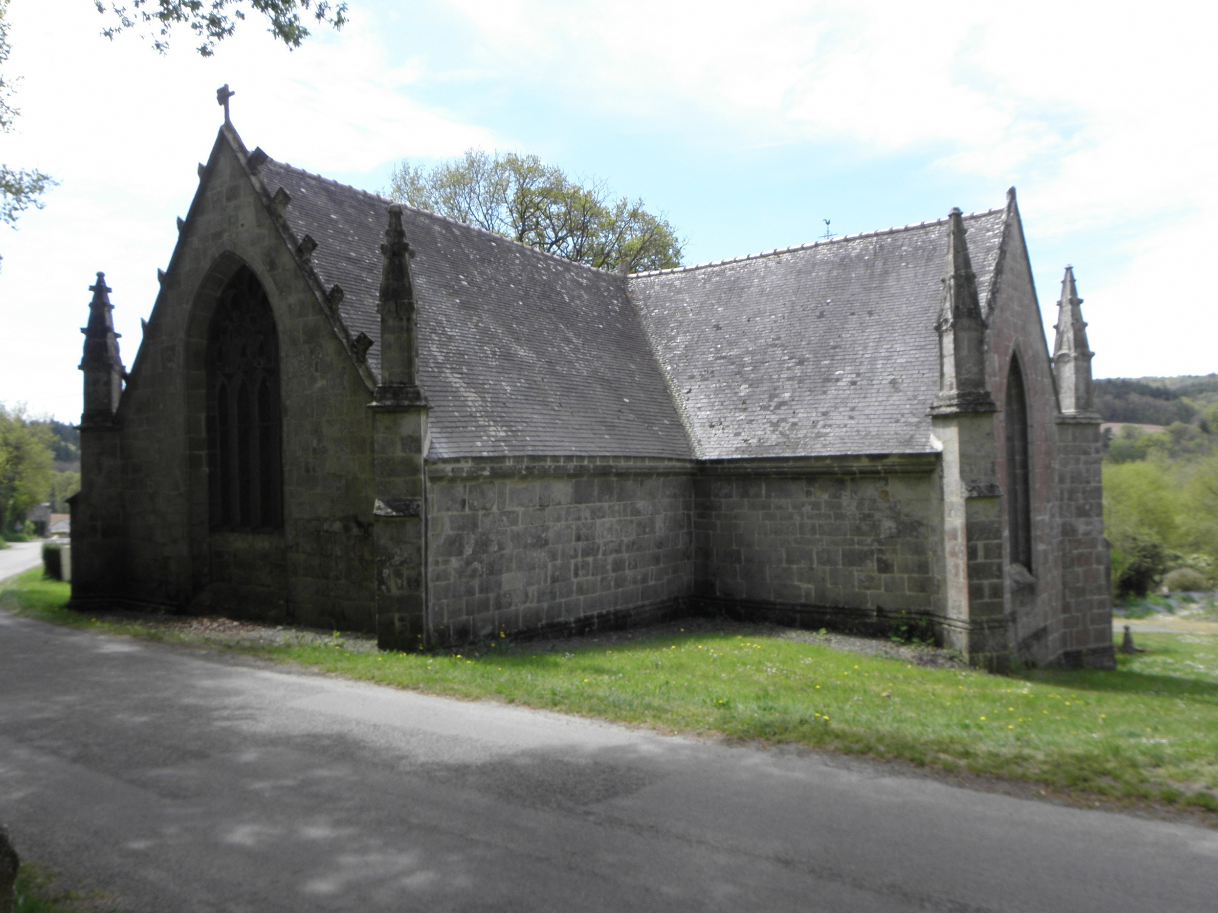 Chapelle Saint-Adrien en Saint-Barthélémy (56). Chevet et croisillon nord.